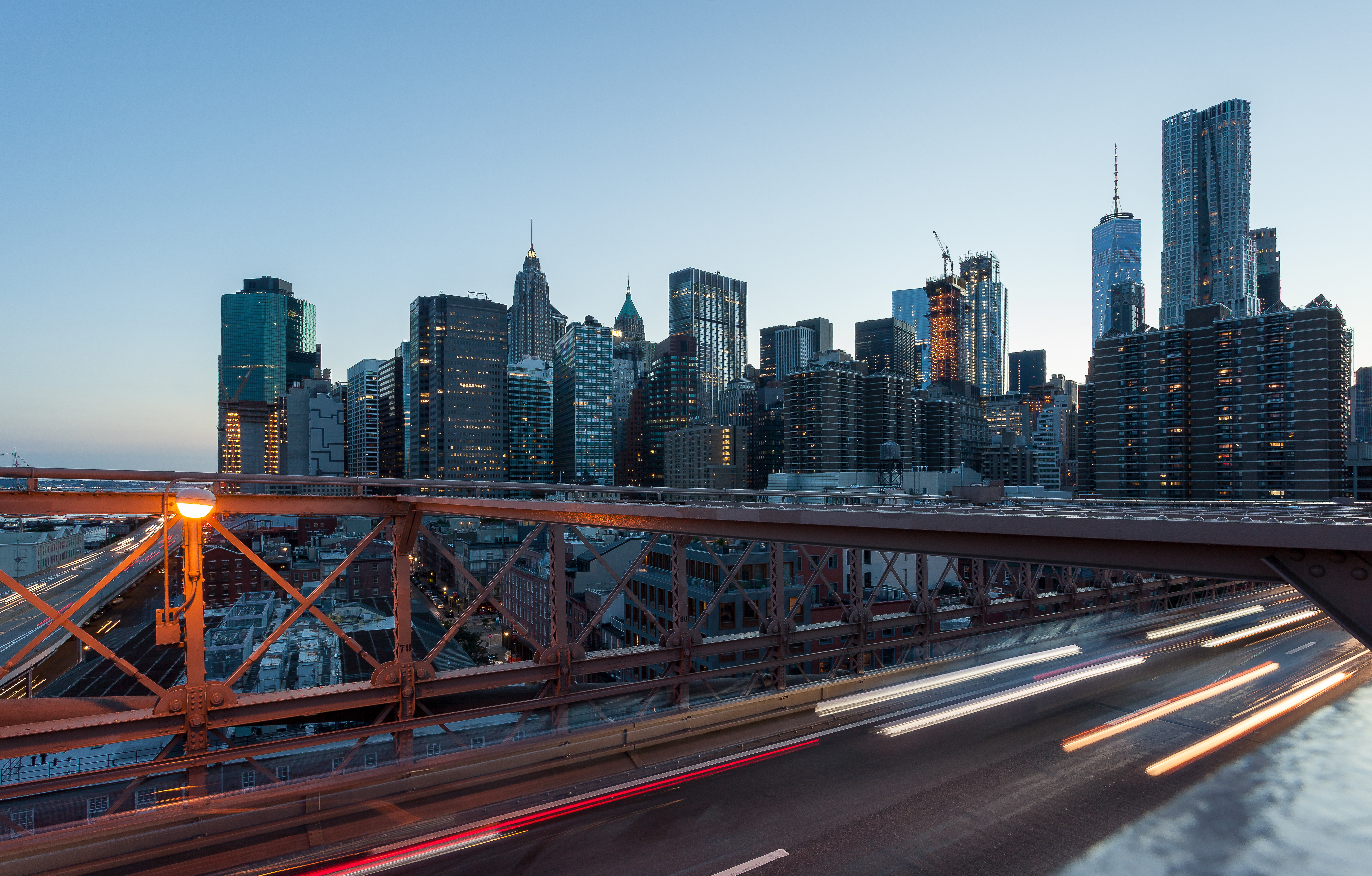 Blick von der Brooklyn Bridge